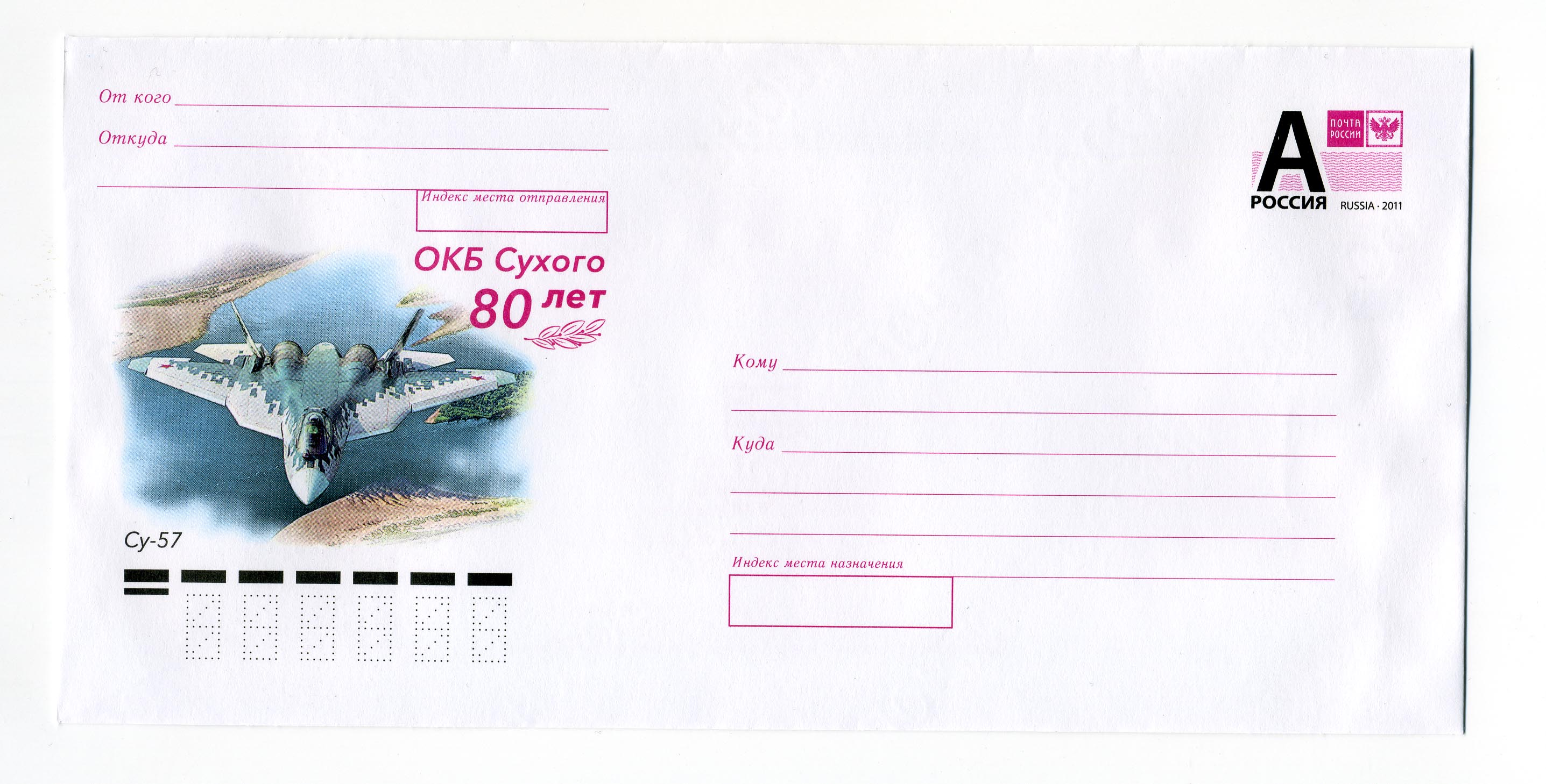 Су-57 почтовый конверт Россия